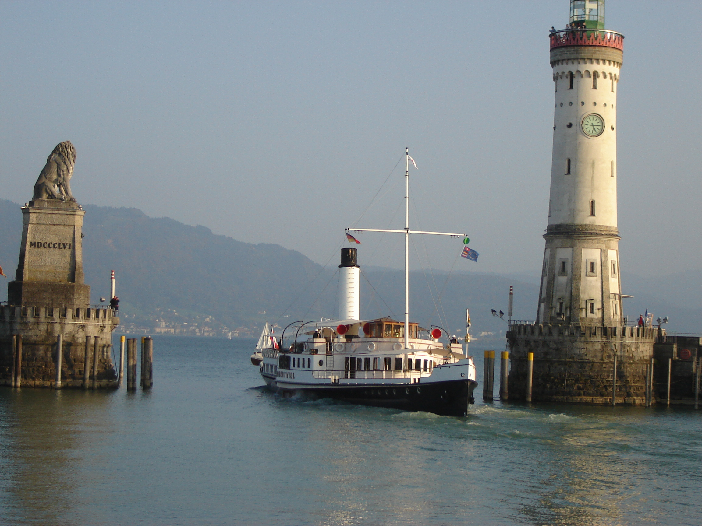 Puerto de Lindau. Faro y Leon.